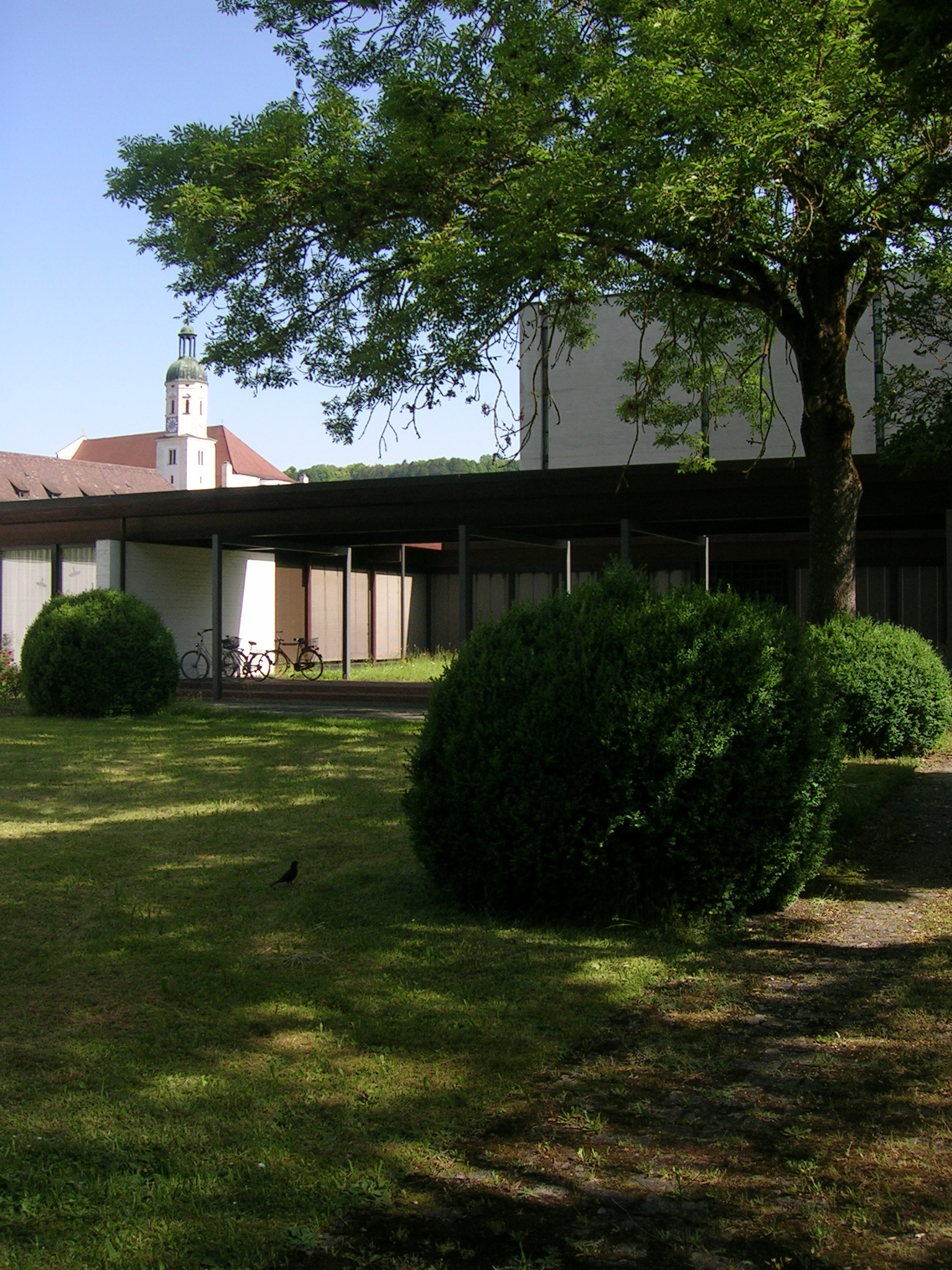 Hofgarten 1 Eichstätt: Teilbibliothek 3.